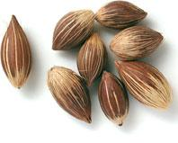 Licuri